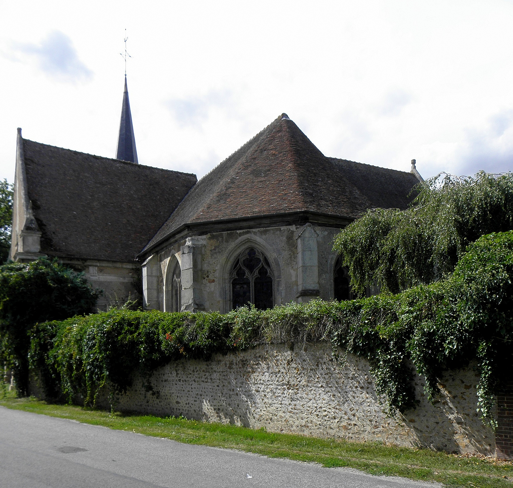 Église Saint-Sulpice de Bérou-la-Mulotière (28). Chevet.